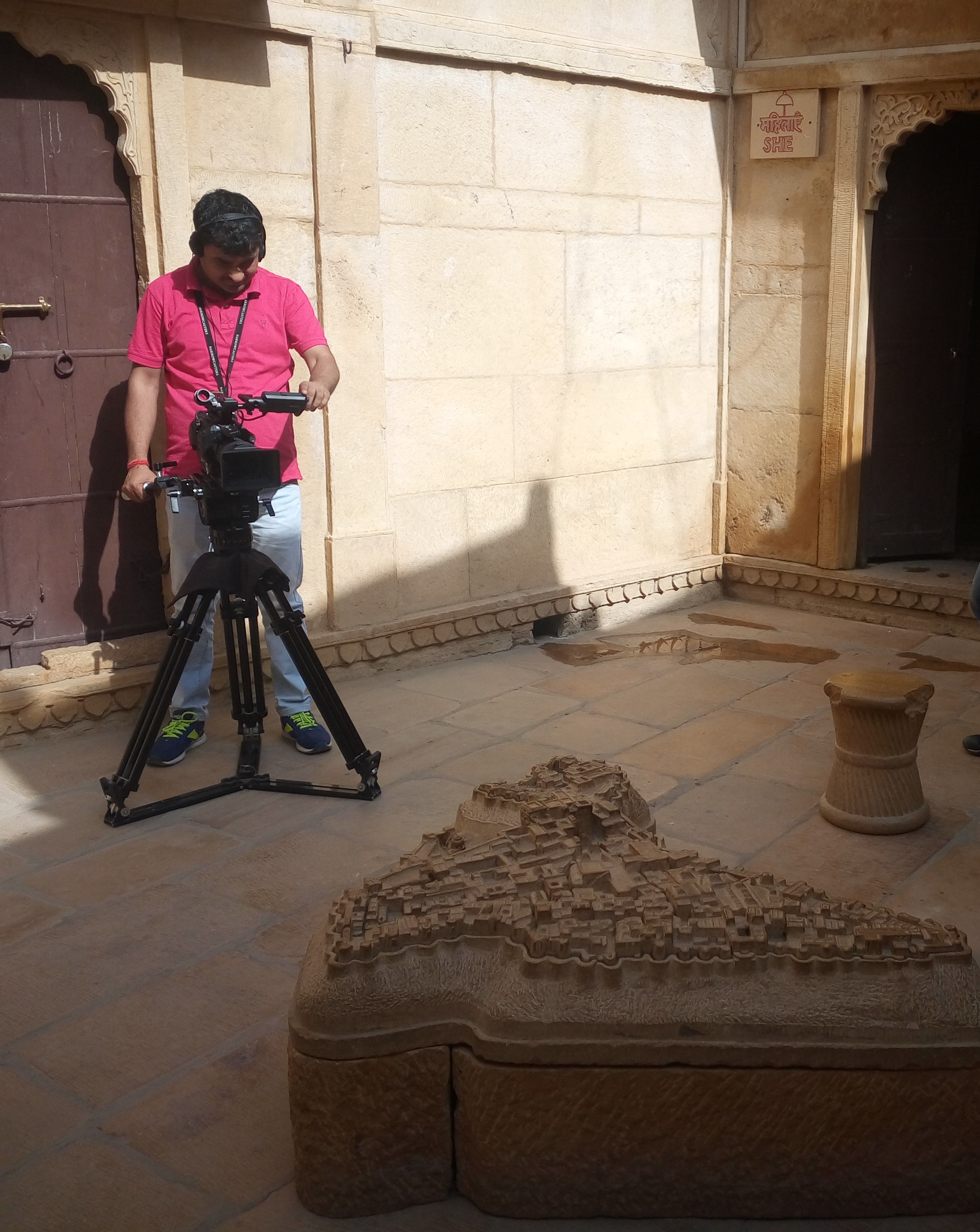 वृत्तचित्र द ब्रदरहुड के निर्देशन के समय जैसलमेर के किले में शूटिंग करते हुए पंकज पाराशर।